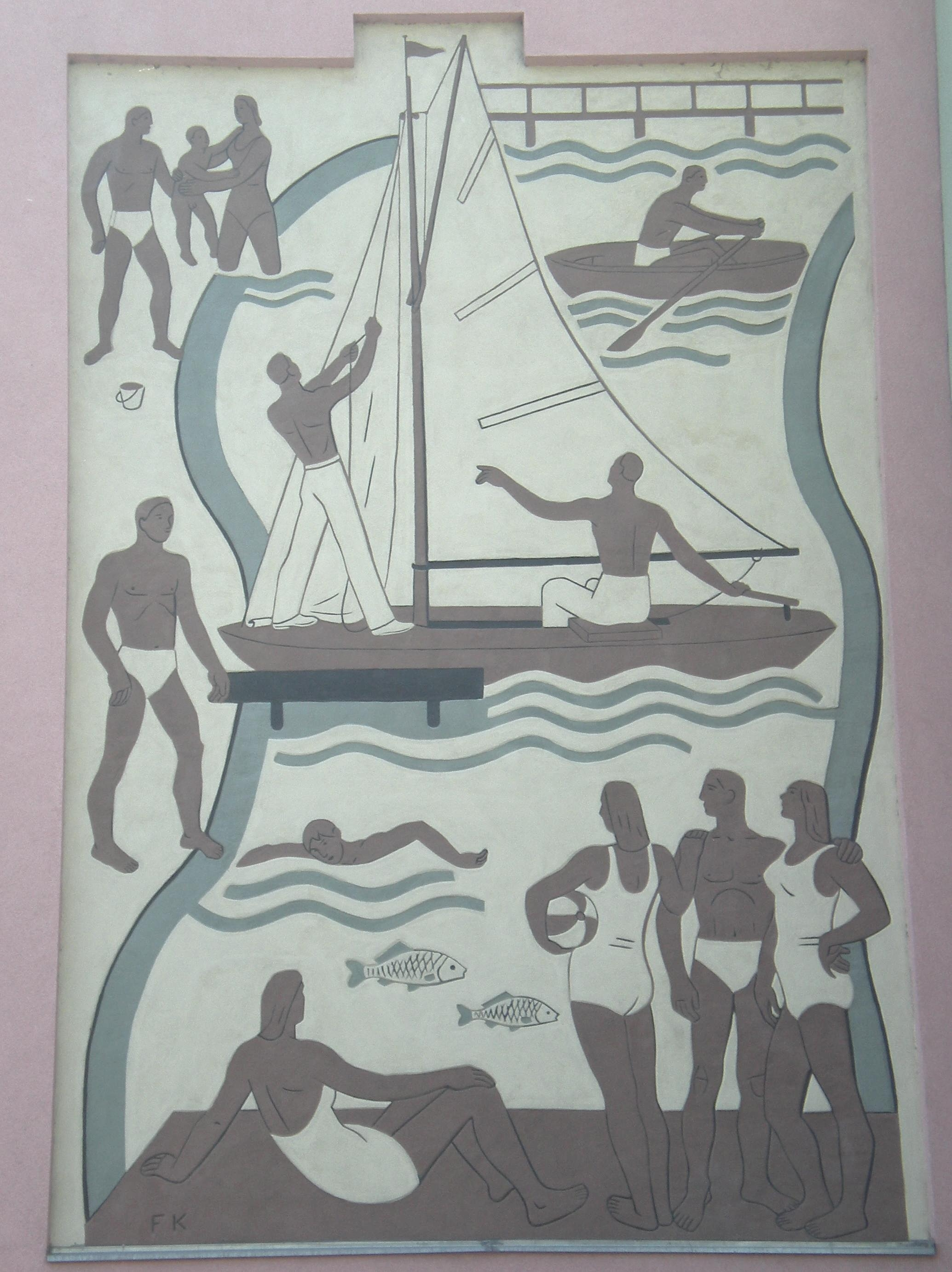 Sgrafittowandgemälde in der Donaustadtstrasse in Wien